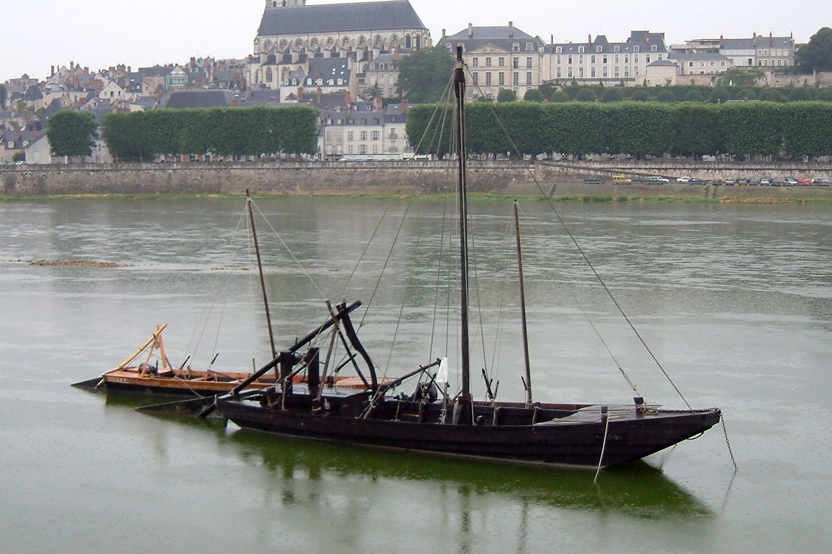 Gabare sur la Loire, devant la cathédrale et l'hôtel de ville de Blois (Loir-et-Cher, France)